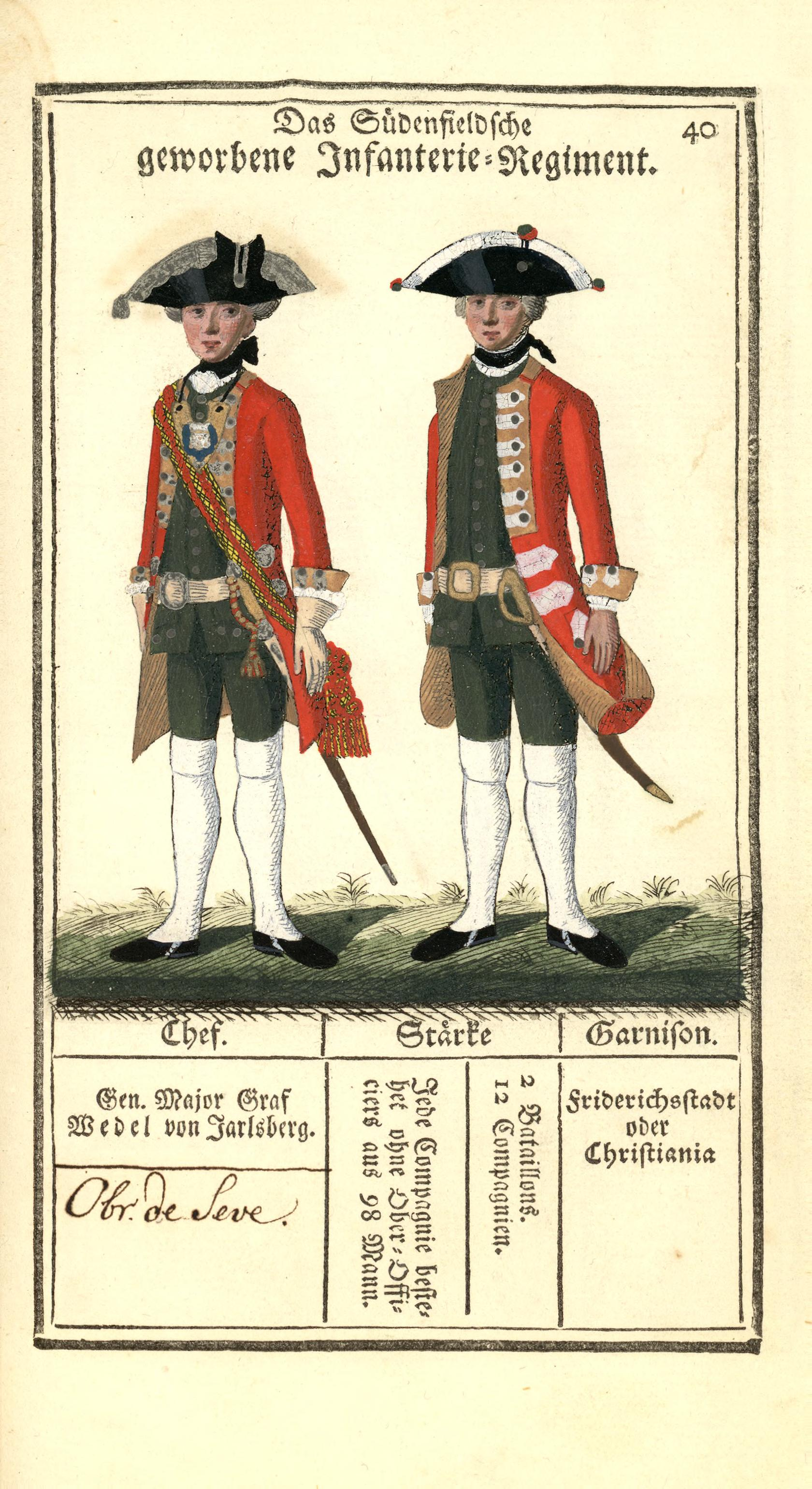 Illustrasjon hentet fra boken "Vorstellung der sämtlichen Königl. Dänischen Armee" av Bertram, Carl og utgitt av Carl Bertram (dk, 1763)